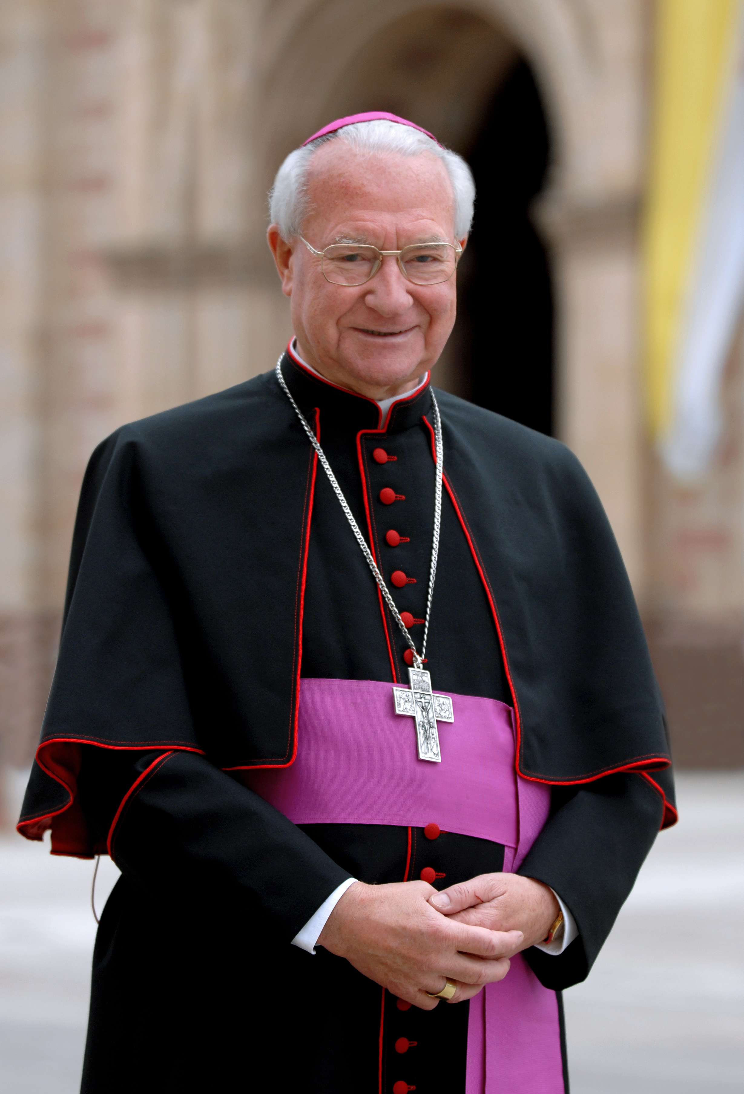 Bischof Dr. Anton Schlembach emeritierter Bischof von Speyer